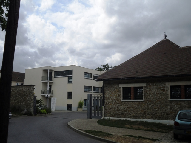 La clinique psychiatrique de L'Abbaye à Viry-Châtillon (Essonne, France).